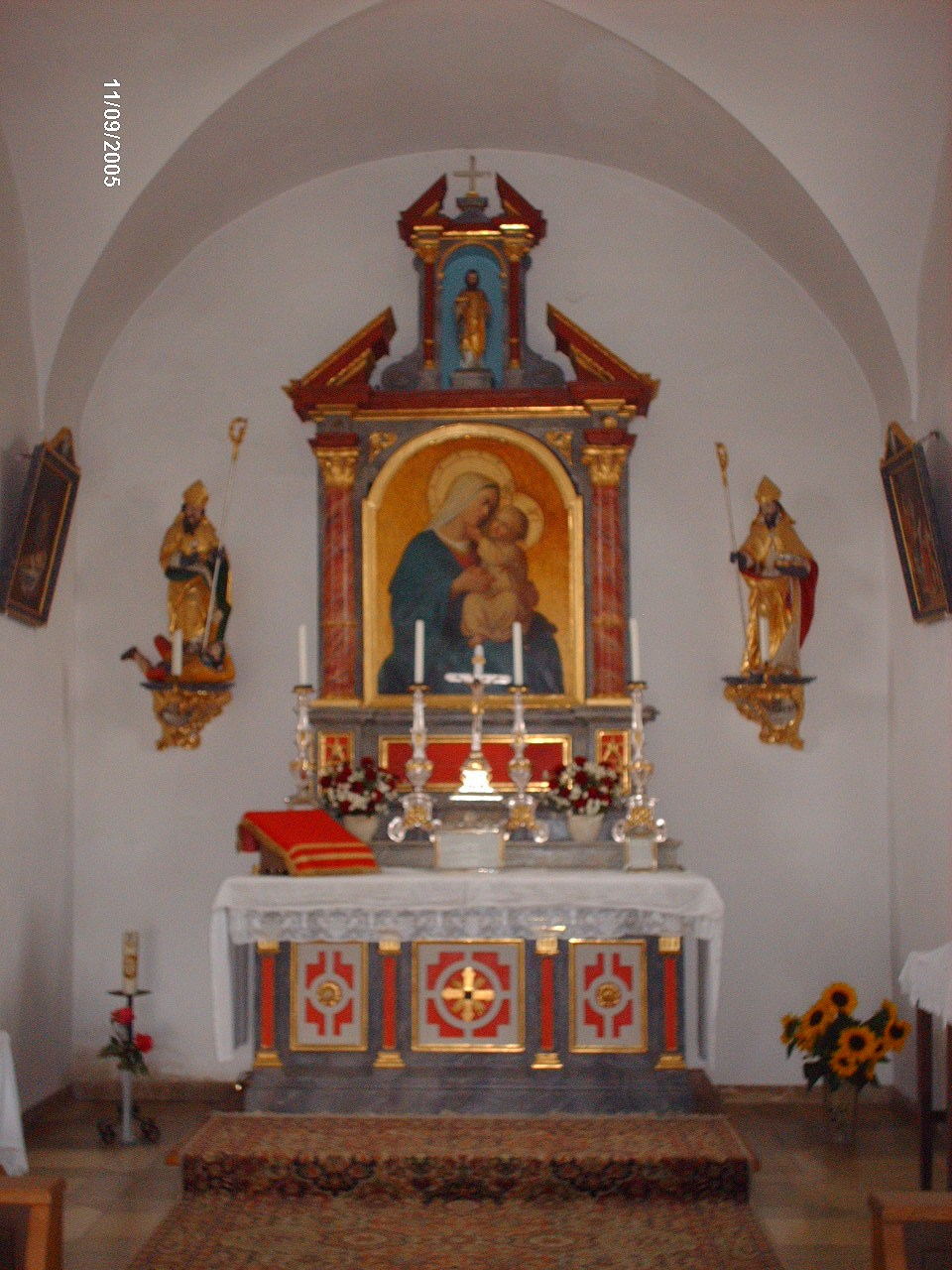 Kath. Kapelle St. Valentinus in Katzenthal